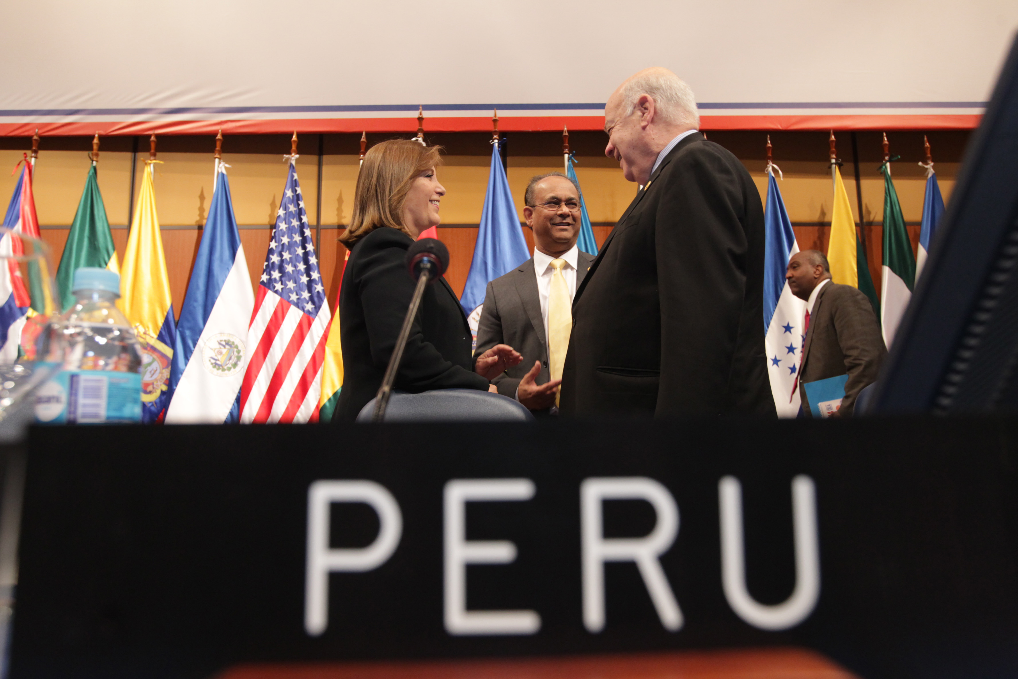 La Ministra de Relaciones Exteriores, Eda Rivas Franchini, presidió esta mañana la ceremonia de instalación de la 44ª Asamblea General de la OEA en Asunción. Agradeció, en nombre de los países miembros, al Presidente del Paraguay por la organización de la conferencia y condujo el proceso de elección de la Presidencia de la Asamblea General, la cual recayó en el Canciller de ese país, Eladio Loizaga.